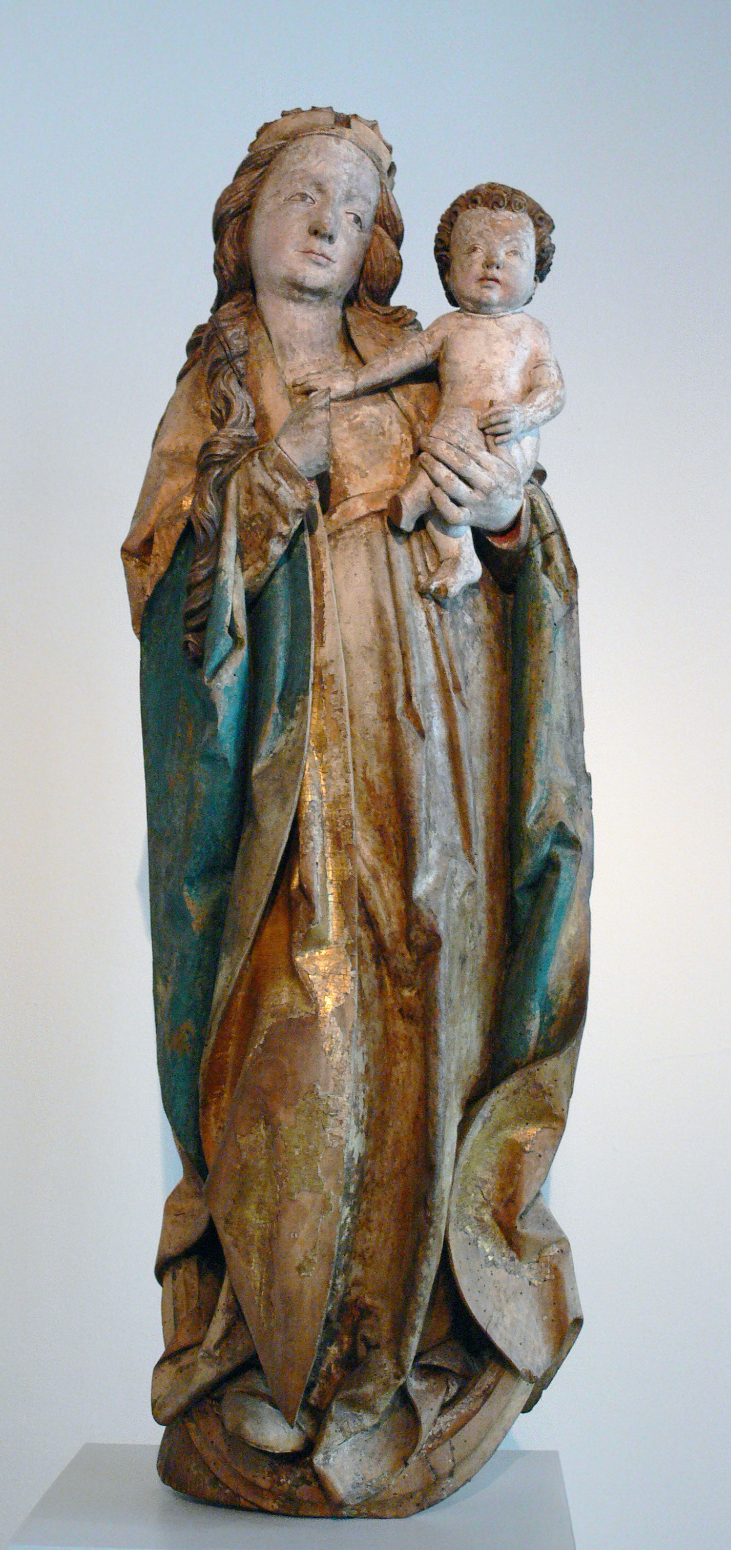 Meister H. W.: Maria mit Kind („Waldkirchener Madonna II“), um 1510, Lindenholz mit originaler Fassung, aus der ehem. Georgskirche in Waldkirchen (Gde. Grünhainichen) bei Zschopau Staatliche Kunstsammlungen Dresden, Skulpturensammlung, SAV 2630 – Leihgabe der Kirchengemeinde Waldkirchen (ausgestellt im Schloßbergmuseum Chemnitz)